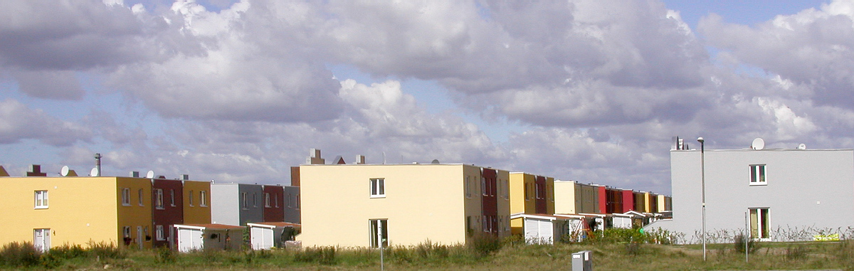 Lübecker Hochschulstadtteil, verdichtete Bebauung